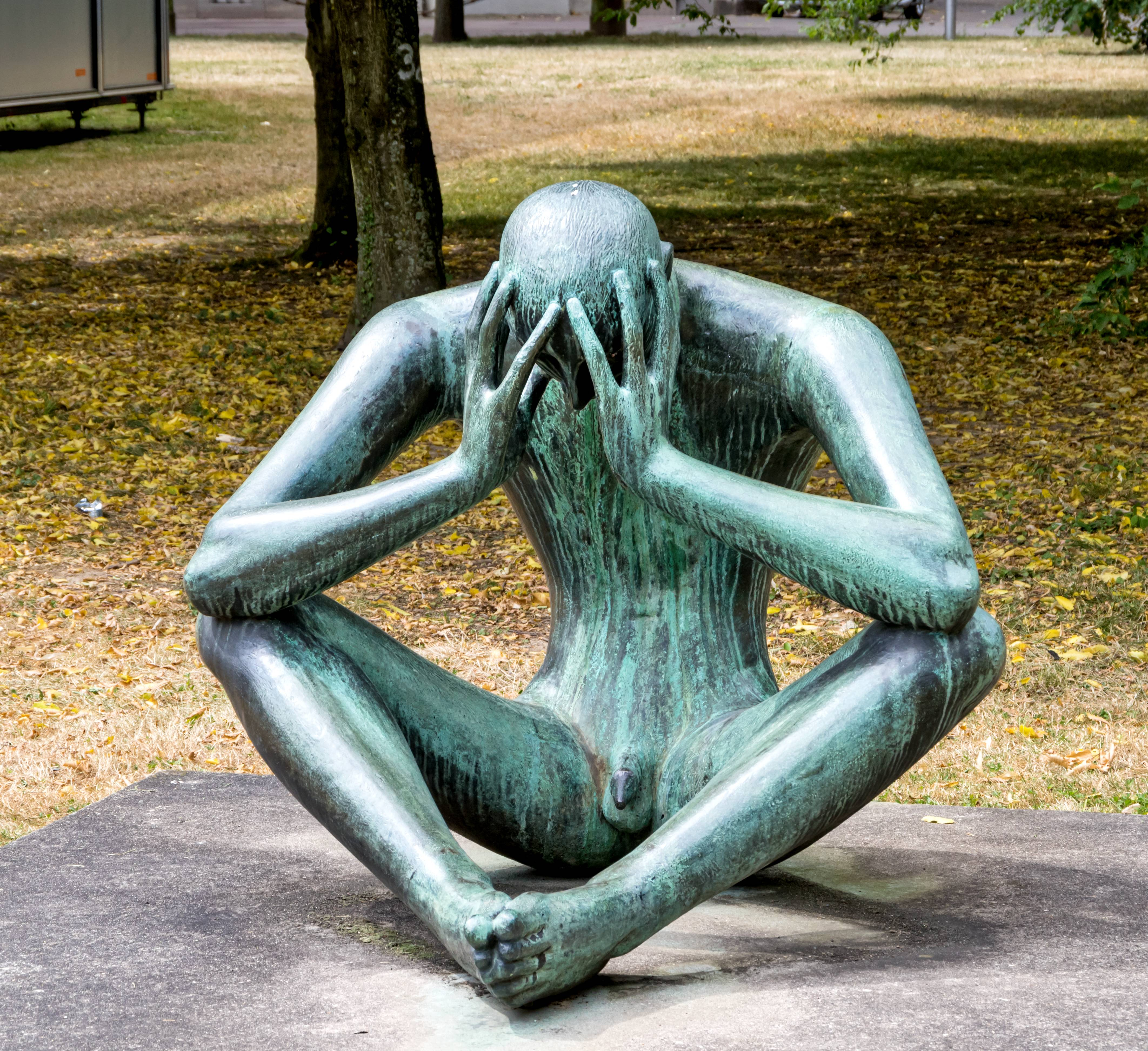 "Der Denker" (1961) von Karl-Heinz Krause auf dem Gelände des KIT